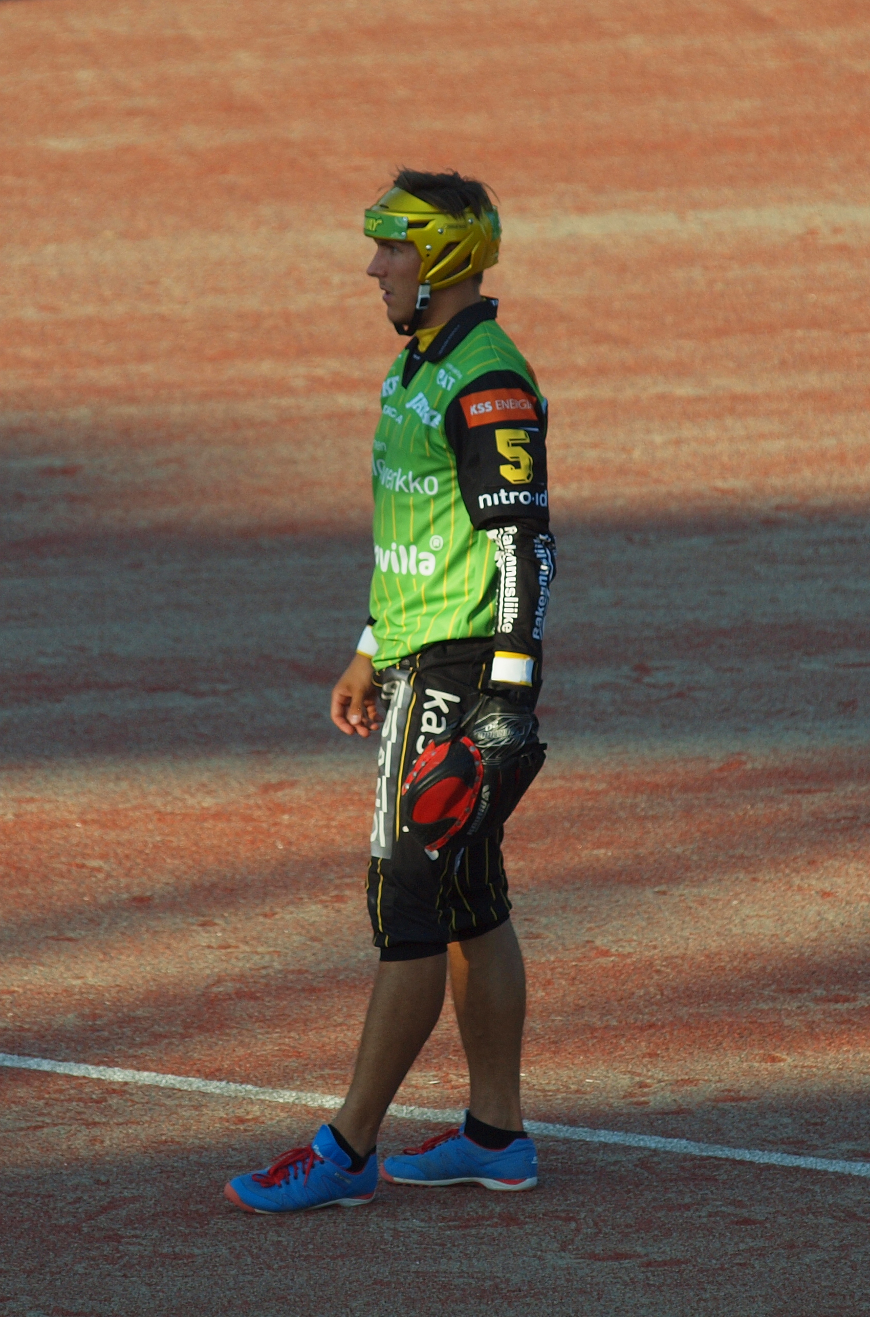 Vimpelin Veto - Kouvolan Pallonlyöjät pesäpallo-ottelu 5.8.2014. Kuvassa Sasu Toikka.